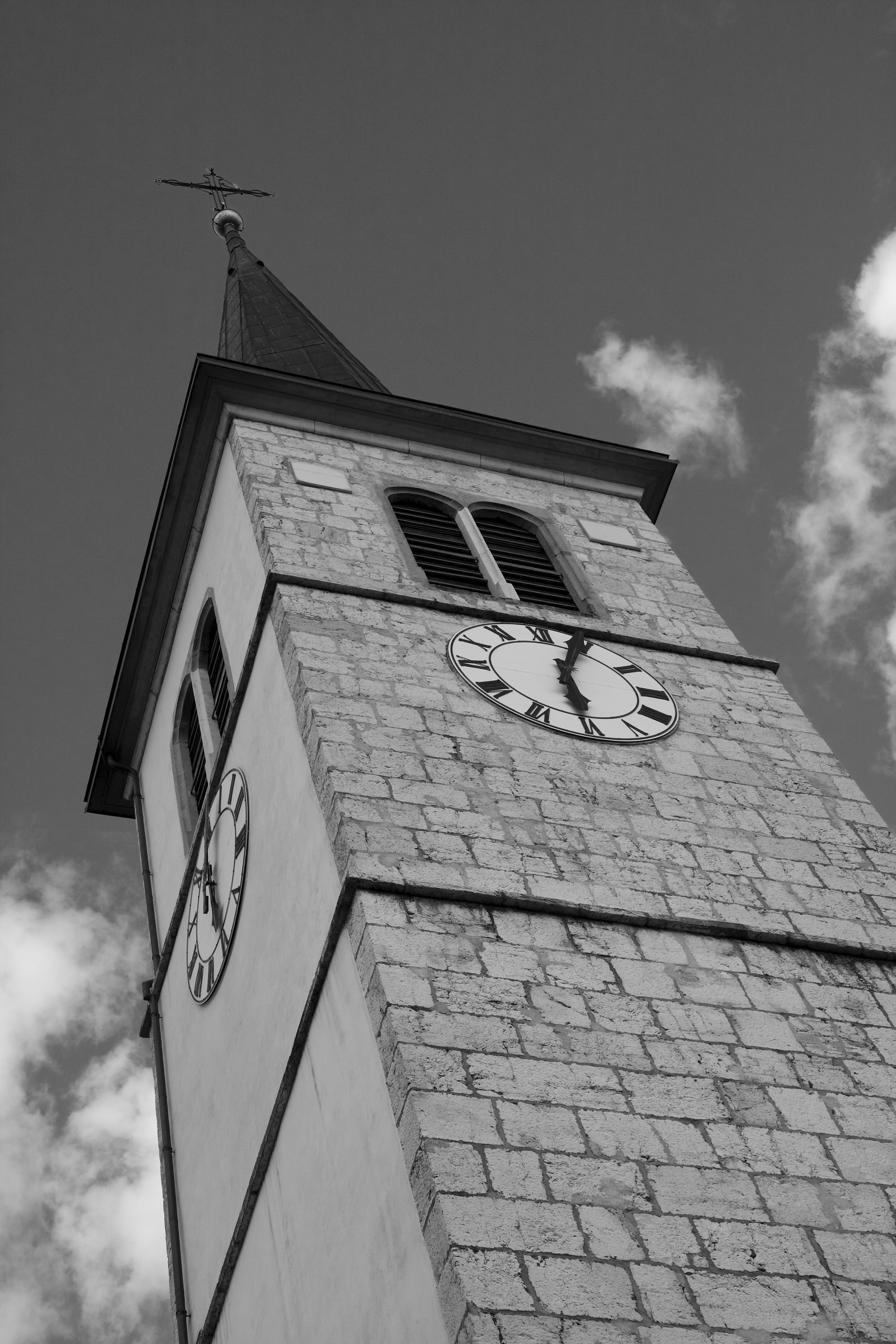 Der Kirchturm von Courrendlin